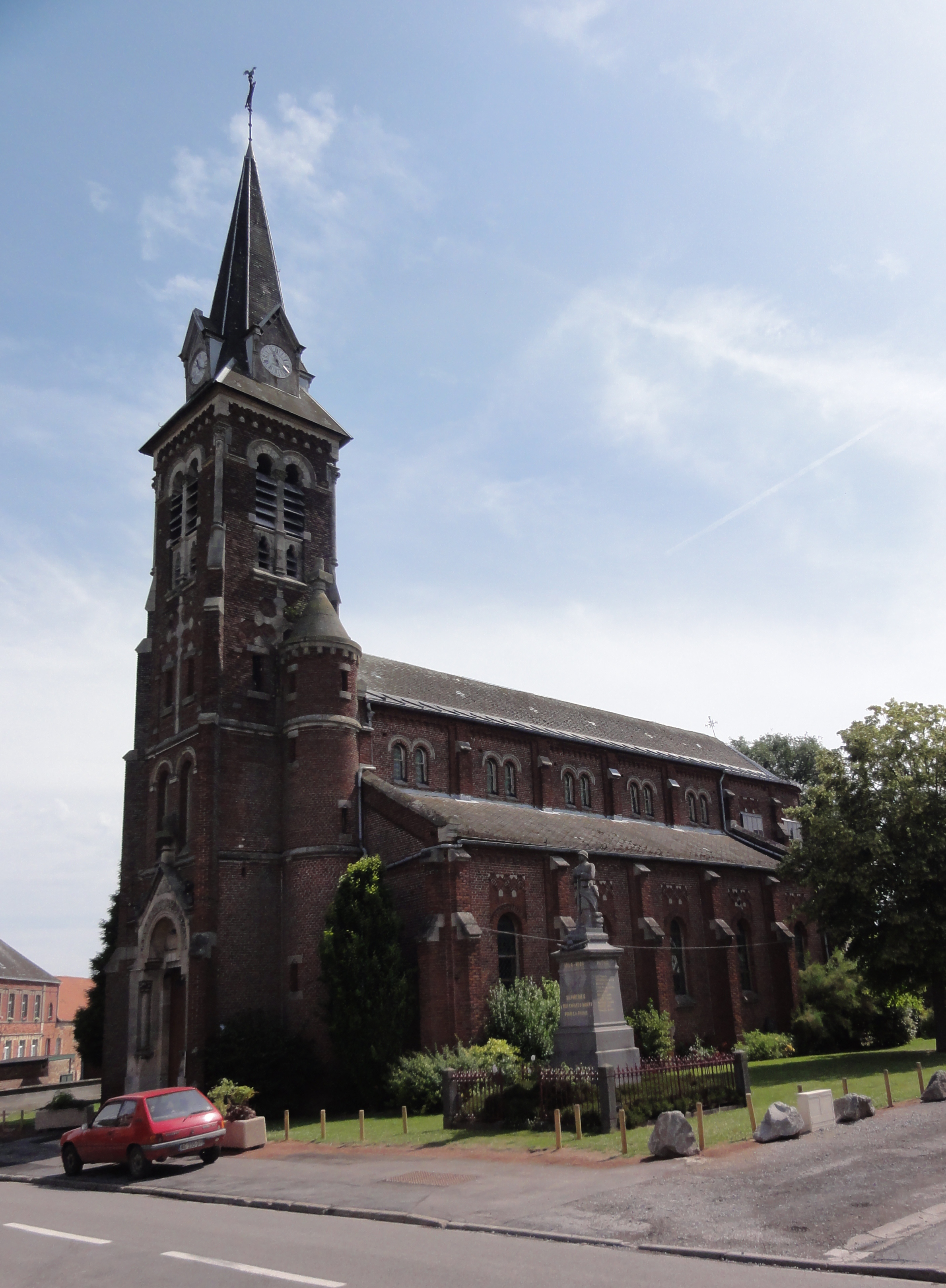 Sepmeries (Nord,Fr) église